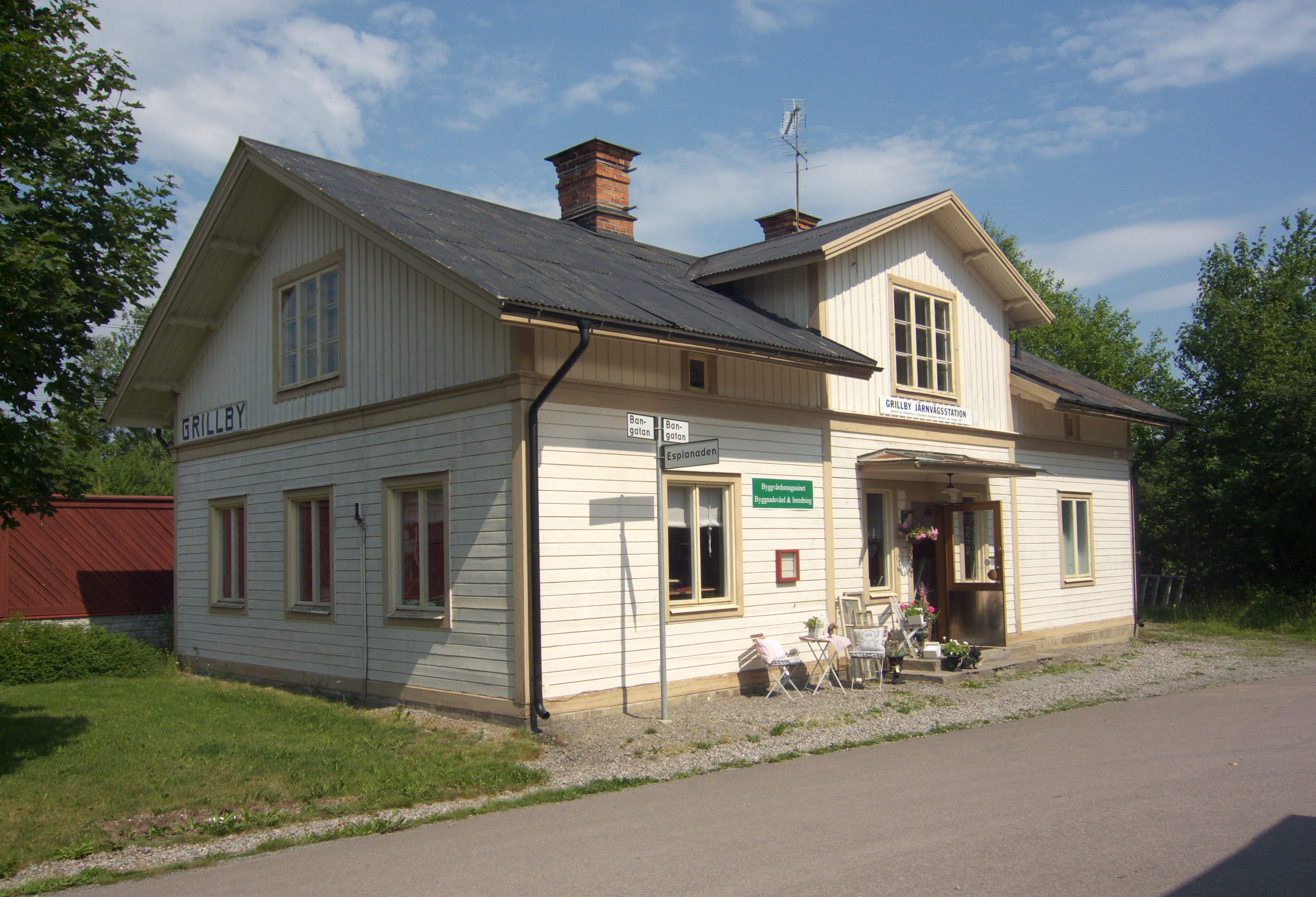 Grillby f d järnvägsstation, numera inrednings- och byggnadsvårdsbutik